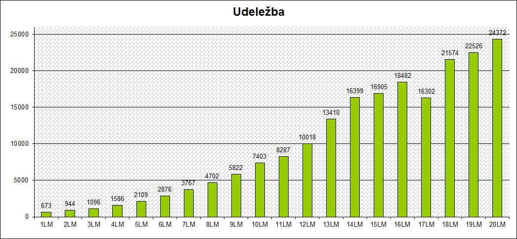 udeležba